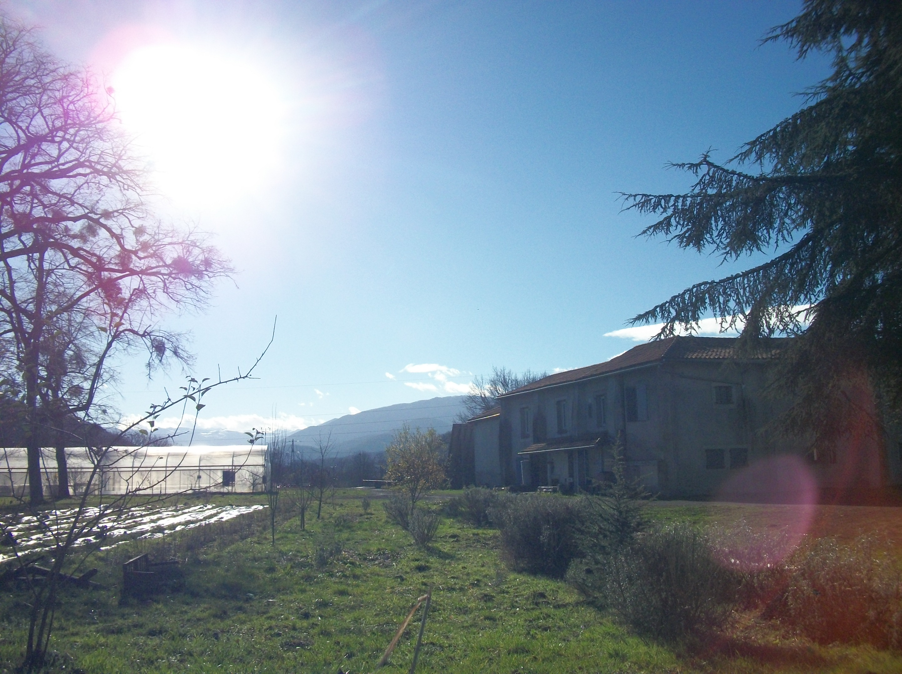 Les Jardins du Comminges